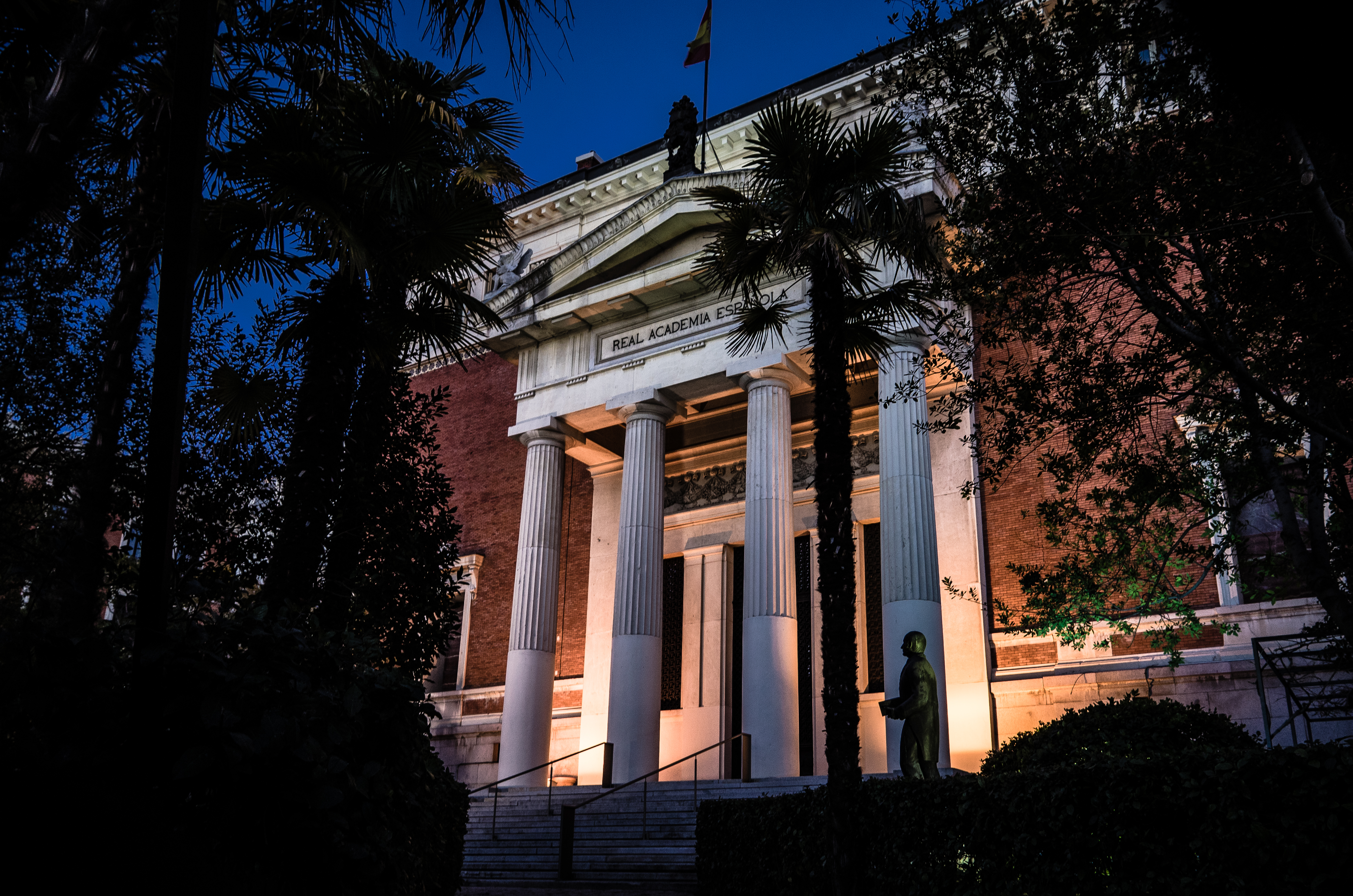 Limpia, fija y da esplendor rq